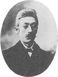 島邨俊一の学位取得をいわって門弟が献呈したもの